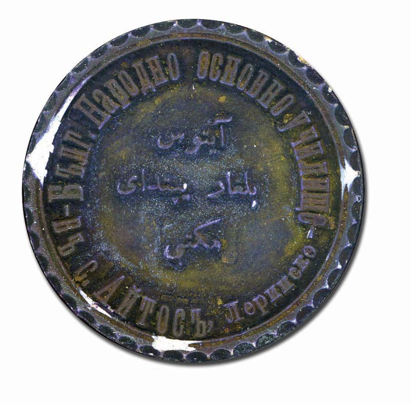 Отпечатък от печат на българското училище в Айтос, днес Аетос, Гърция.